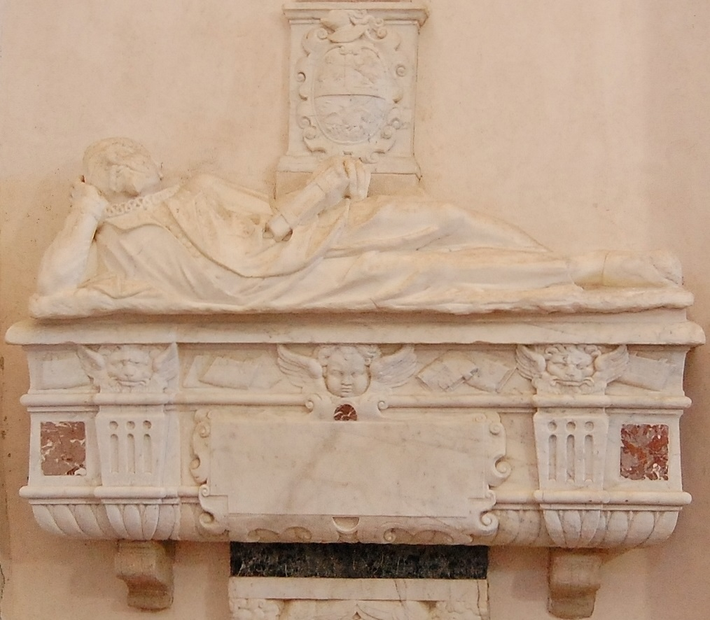 Sepolcro di Ottavio o Filippo Polizzi, opera dello scultore Lorenzo Calamech, terminata nell'anno 1599, nel duomo di Gerace.